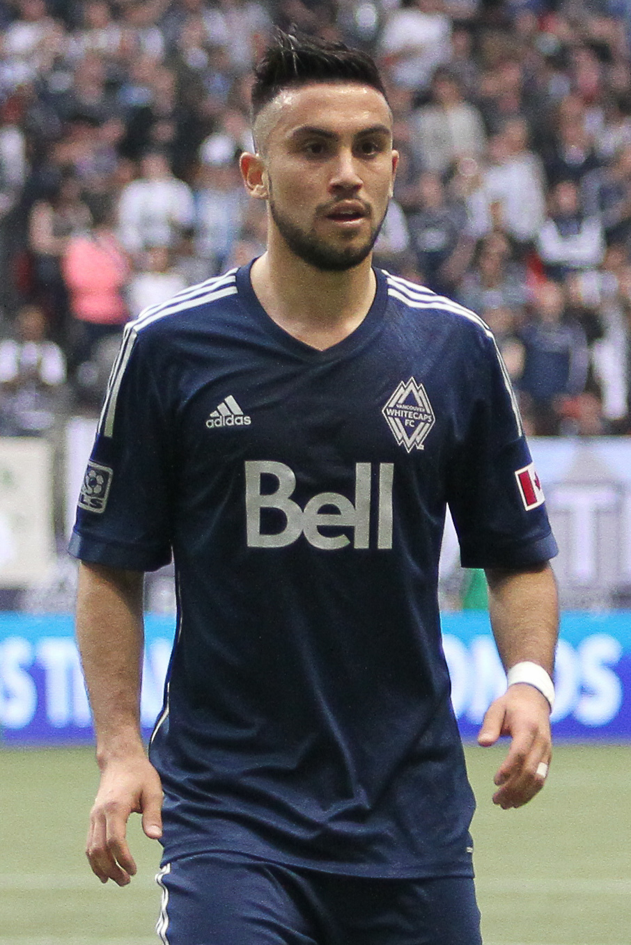 Pedro Morales en el Vancouver Whitecaps.